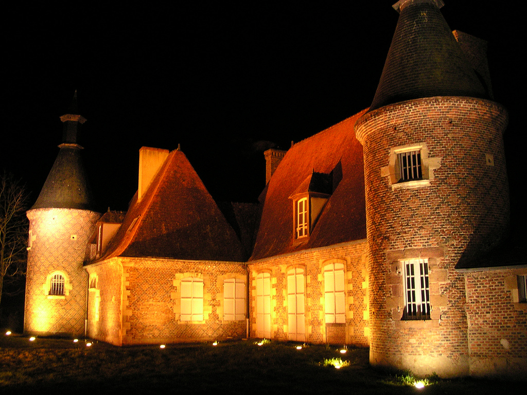 Le Château de Panloup à Yzeure (Allier, Auvergne, France).